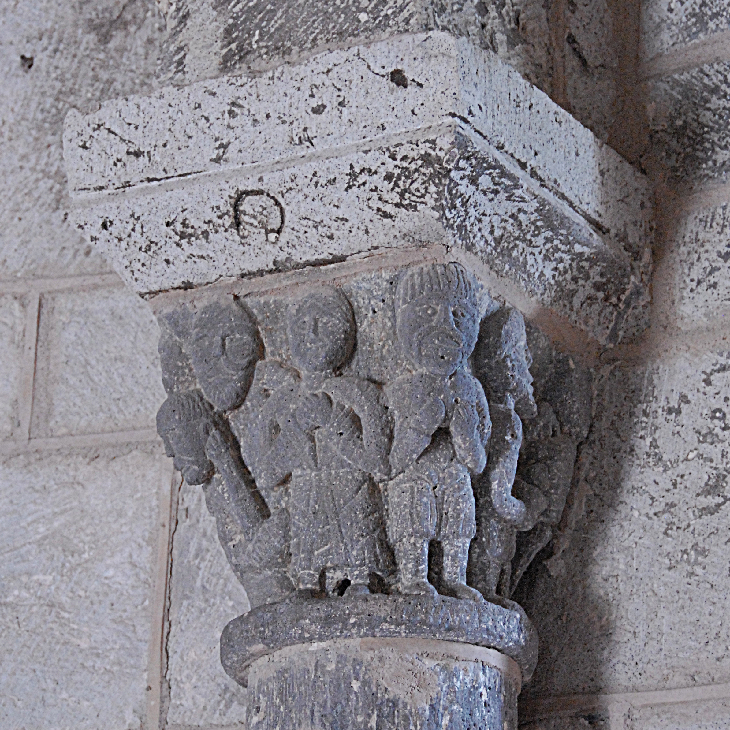 Chambon-sur-Lac, Friedhofskapelle, Kapitell, 9 Männer, halbrechts